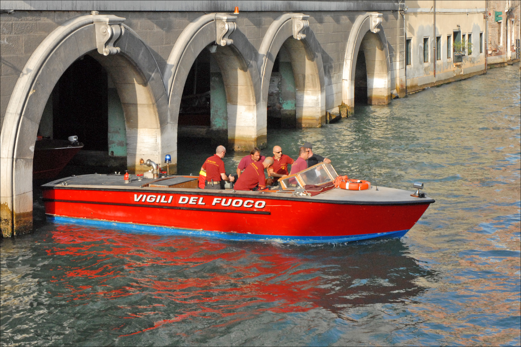 Pompiers de Venise sortant de leur caserne Vigili Del Fuoco - Comando Provinciale-Sezione Marittima